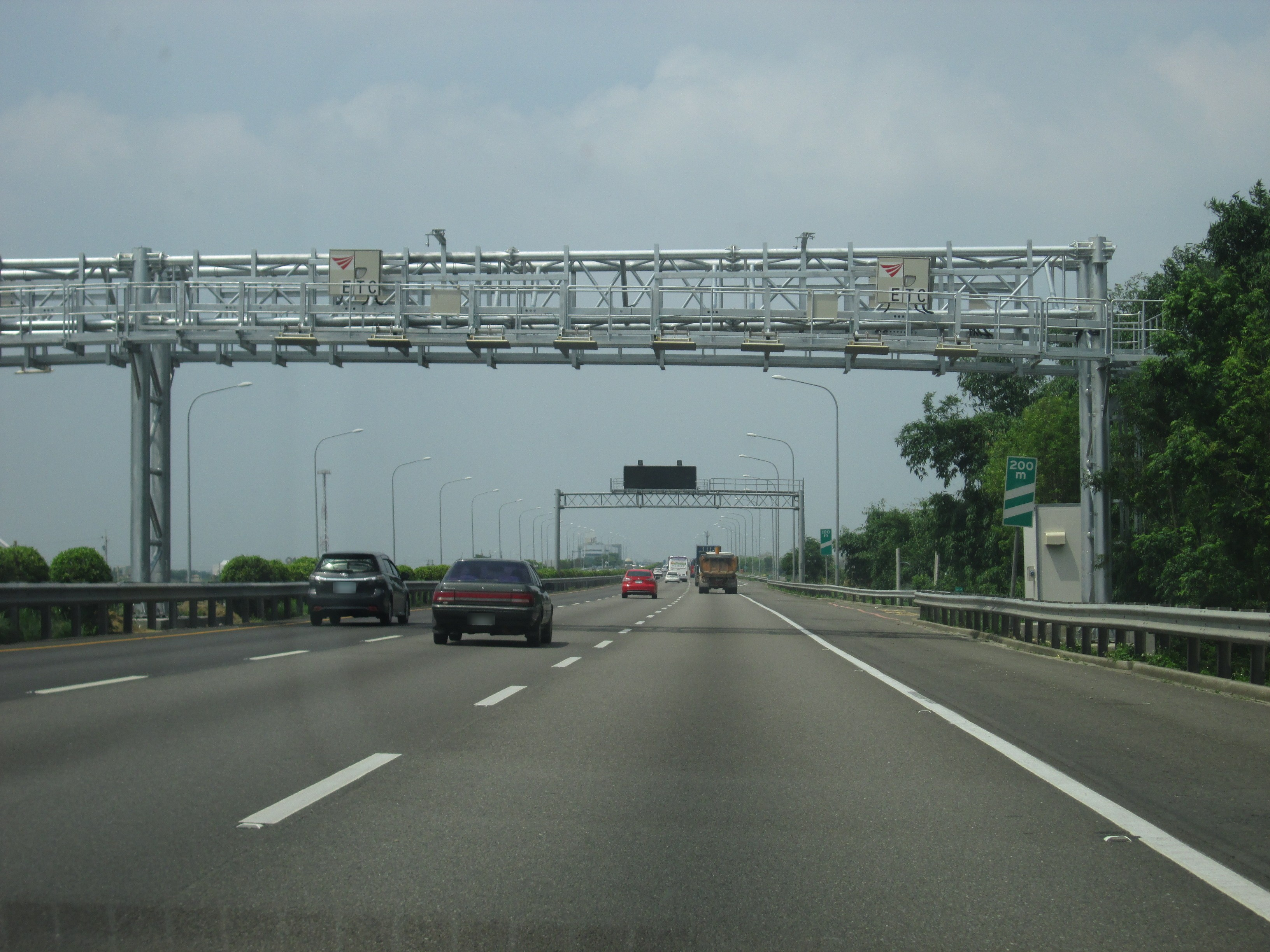 嘉義縣大林鎮 中山高速公路 電子收費門架